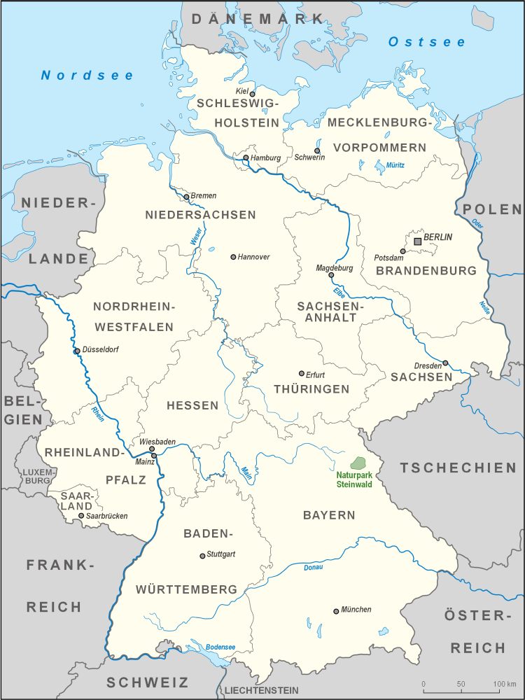 Karte des Naturparks Steinwald in Deutschland